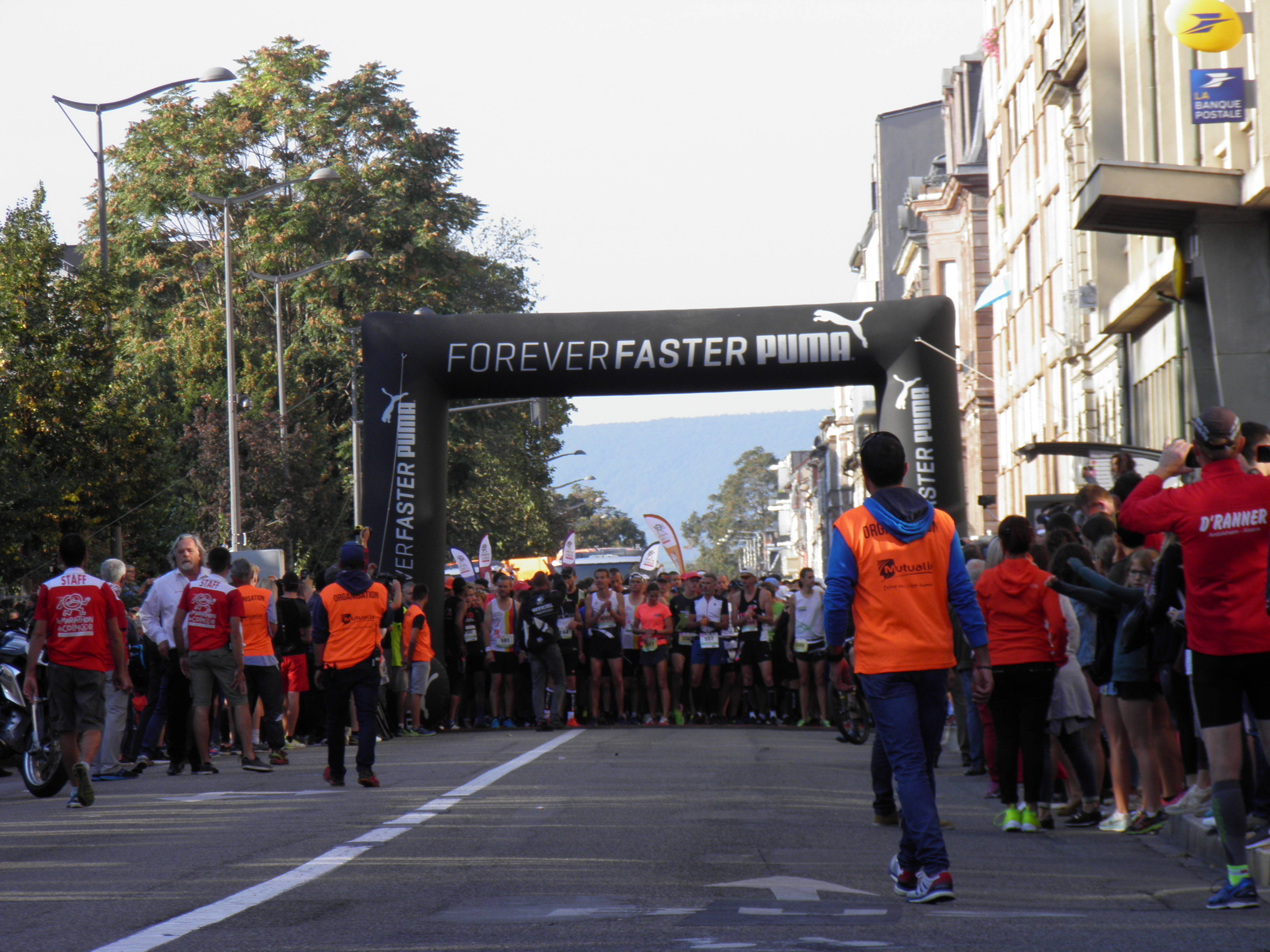 Sur la ligne de départ du marathon de Colmar (Haut-Rhin, France).